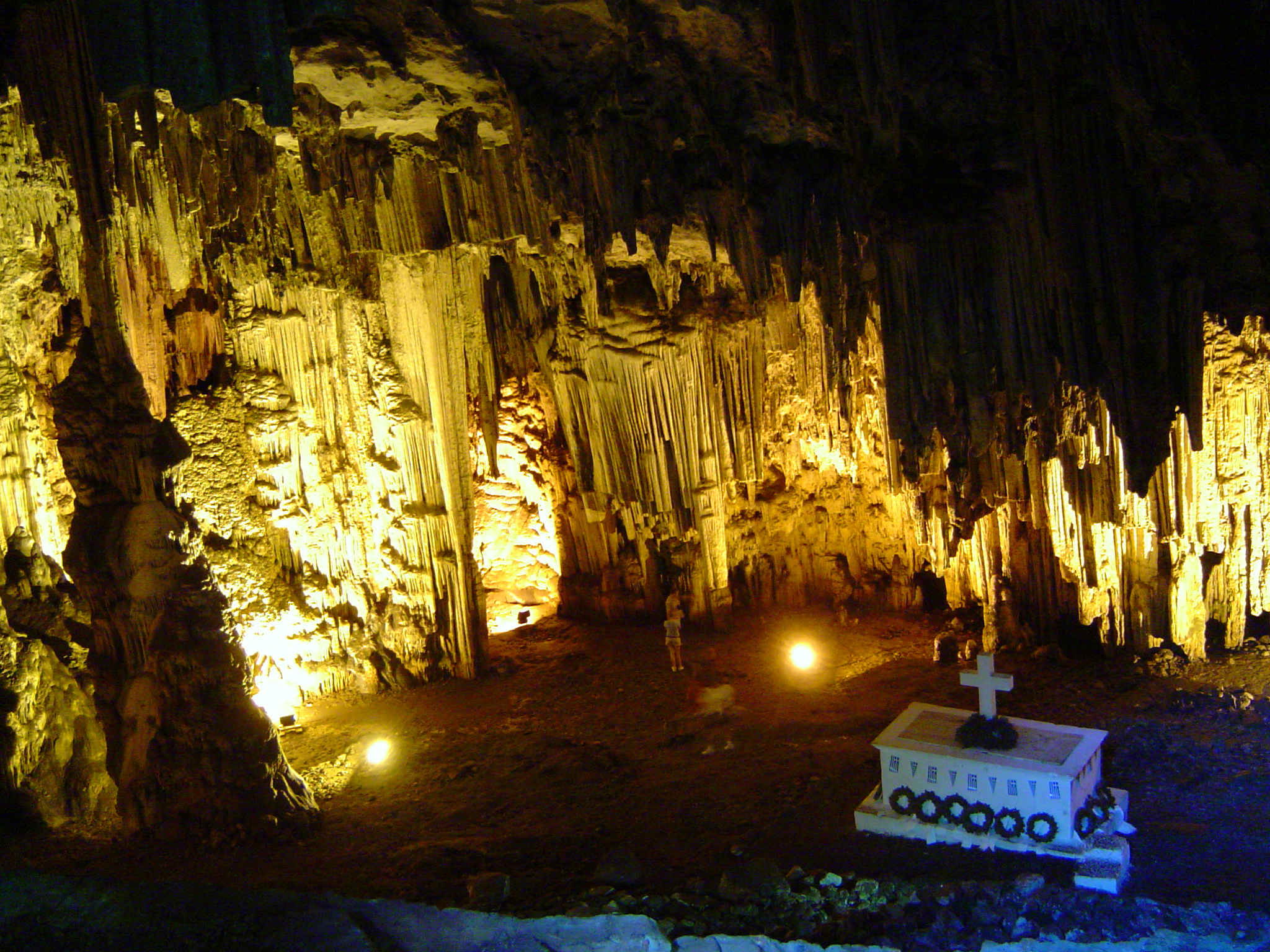 Melidoni-Höhle (Kreta)